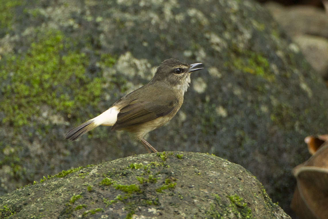 Buff-rumped Warbler - Sarapiqui - Costa Rica_S4E1339